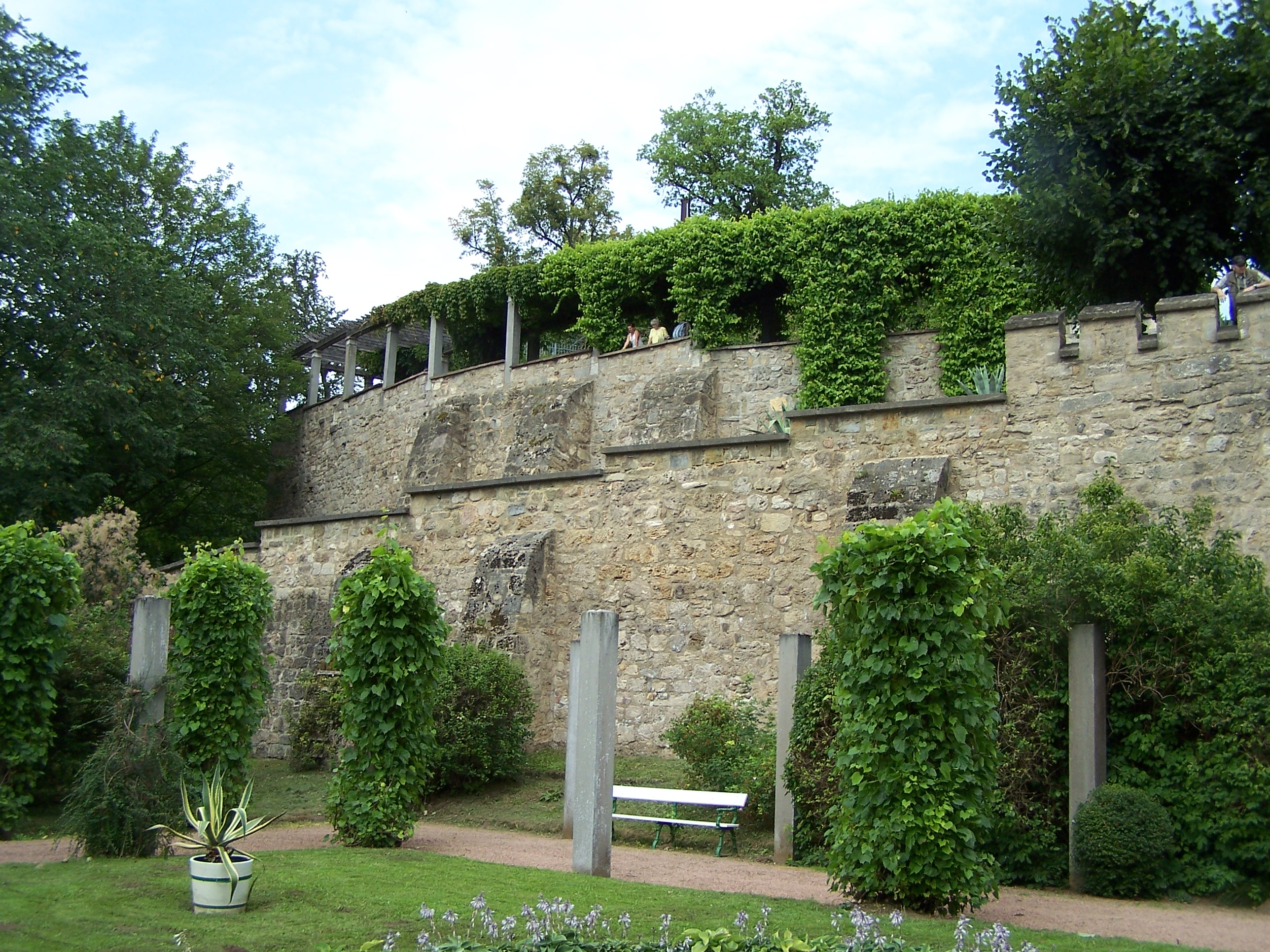 Die Terrassenmauern am Schloss Altenstein bestehen in Teilen aus den mittelalterlichen Resten der Ringmauer der Vorgängerburg.